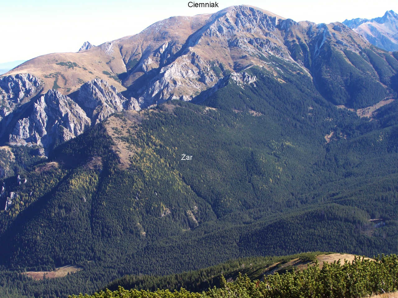 Ciemniak, Smreczyński Żar, Dolina Tomanowa